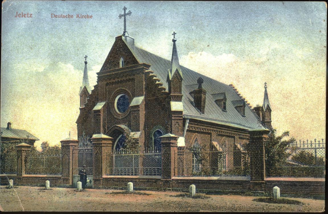 Елец. Протестантская кирха. Цветная открытка начала 20 века.